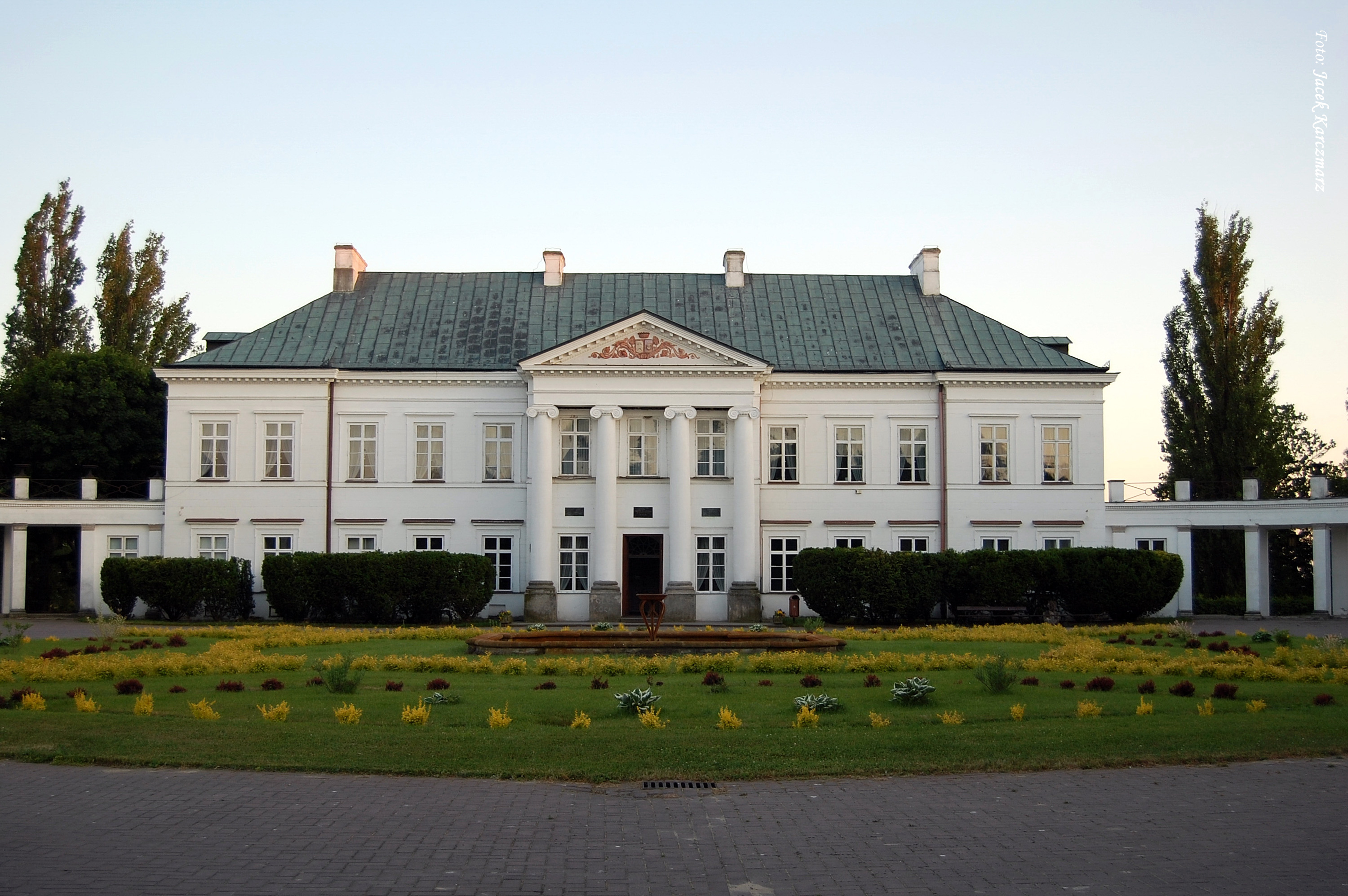 Kock Pałac Jabłonowskich